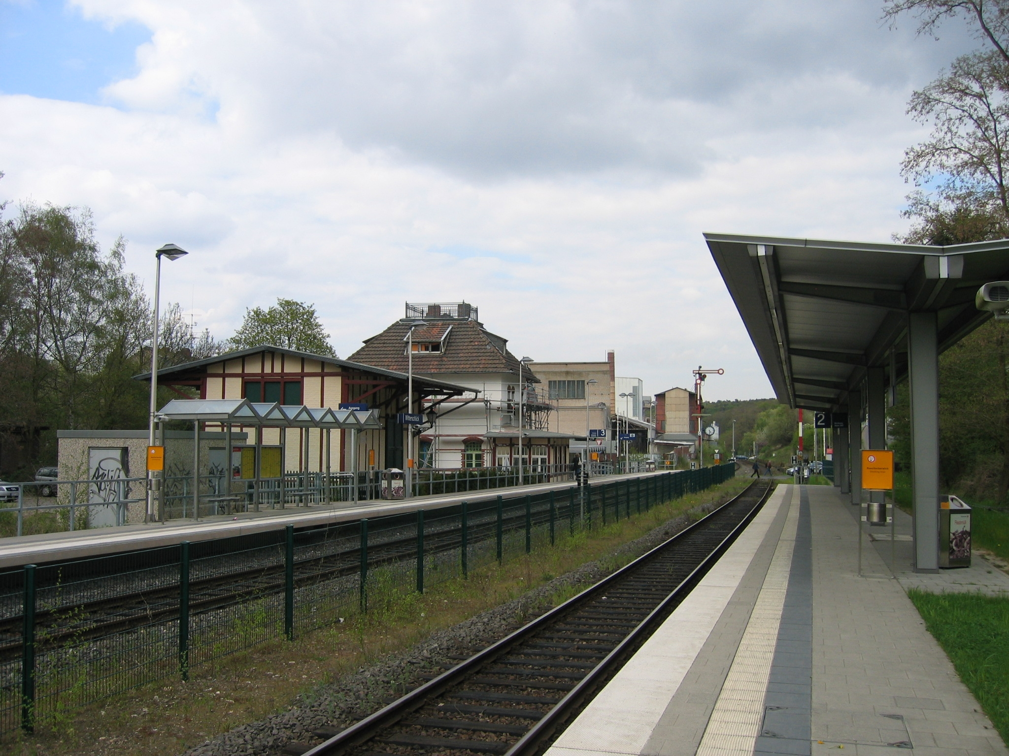 Bahnhof Witterschlick der Voreifelbahn, Alfter